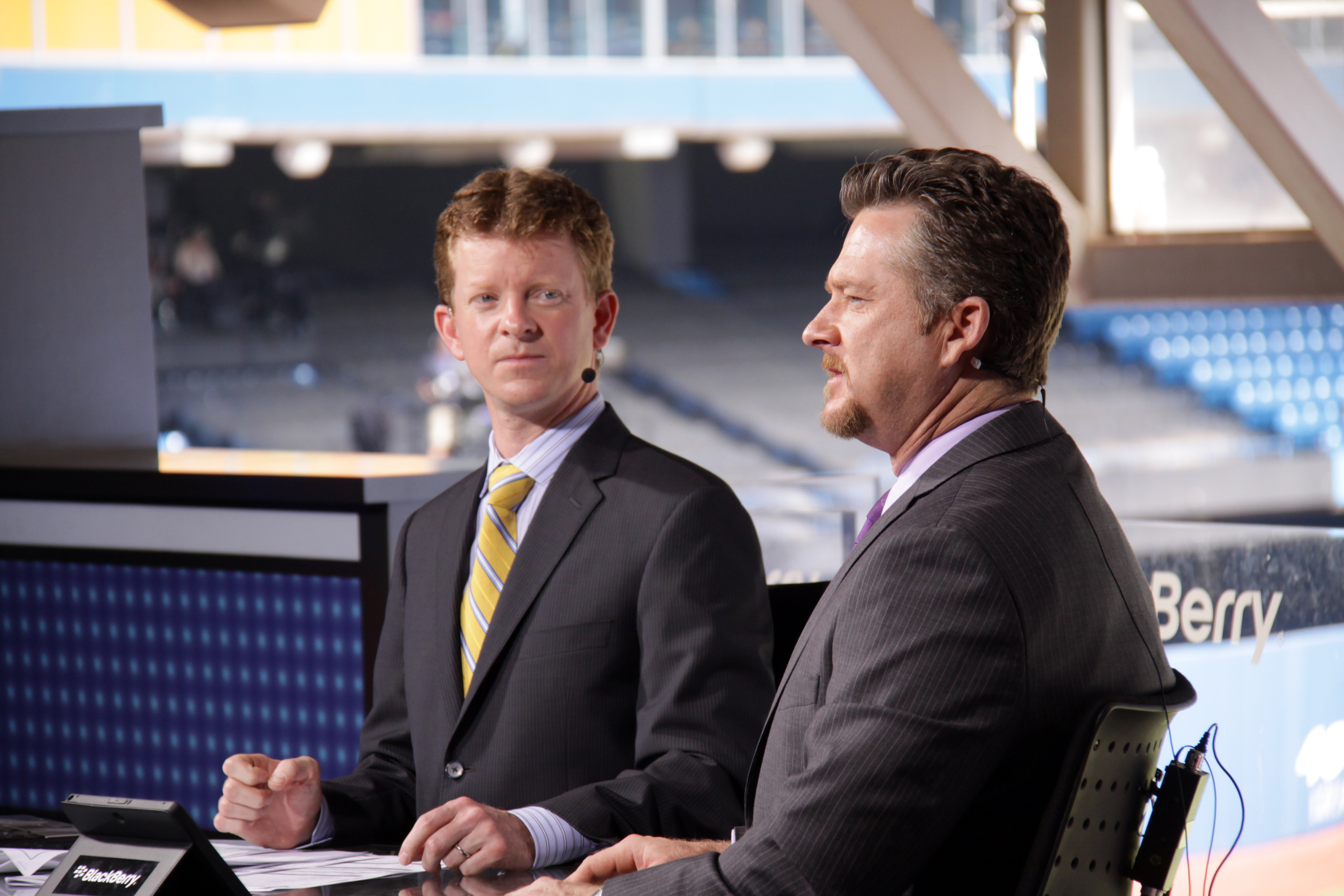 2011_08_13_IMG_1509